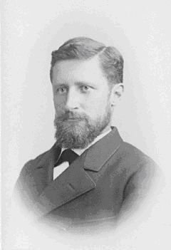 Eugen Huber, Switzerland